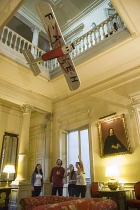 Hall de honor de Villa Ocampo